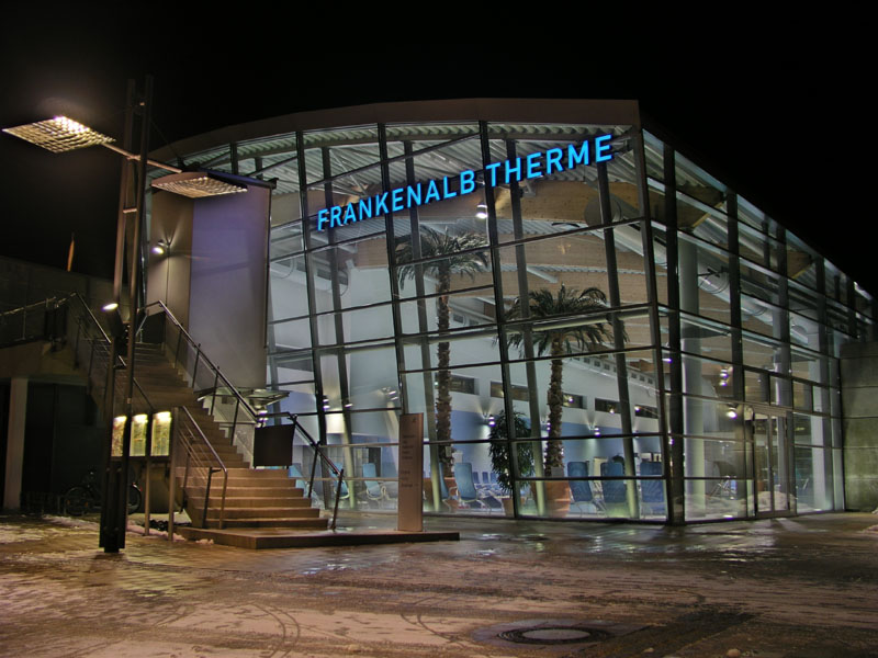 Frankenalbtherme im Winter 2005